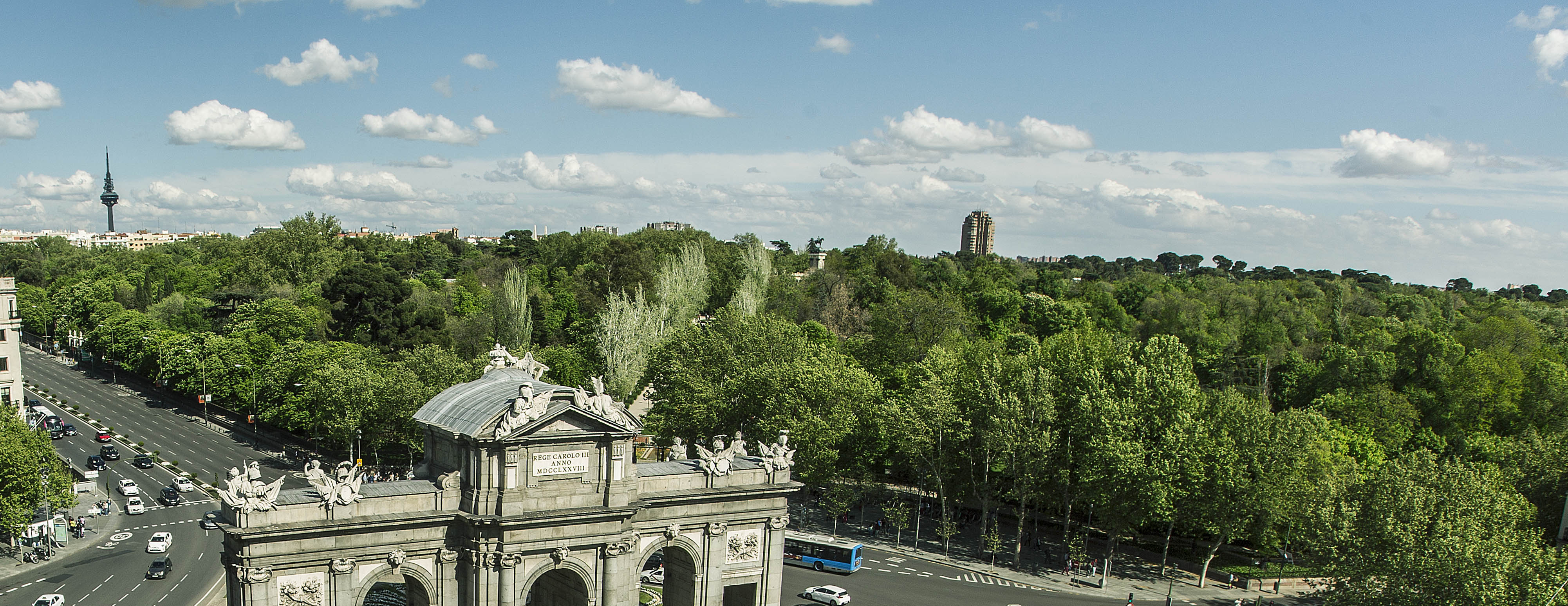 Presentación Candidatura